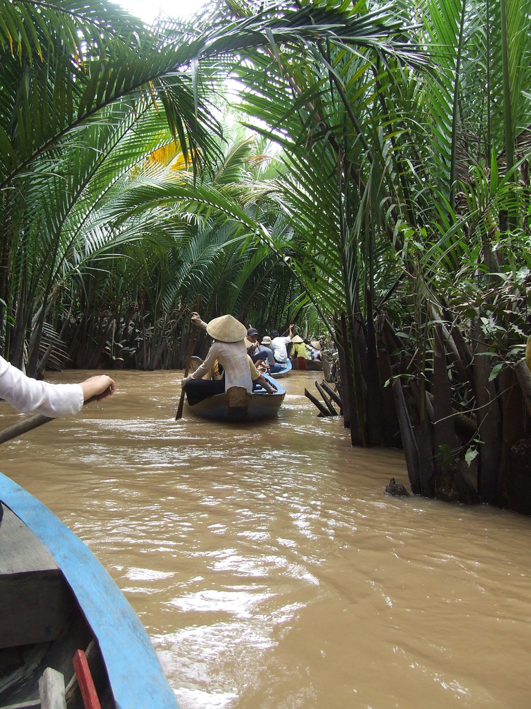 Mekong Delta river